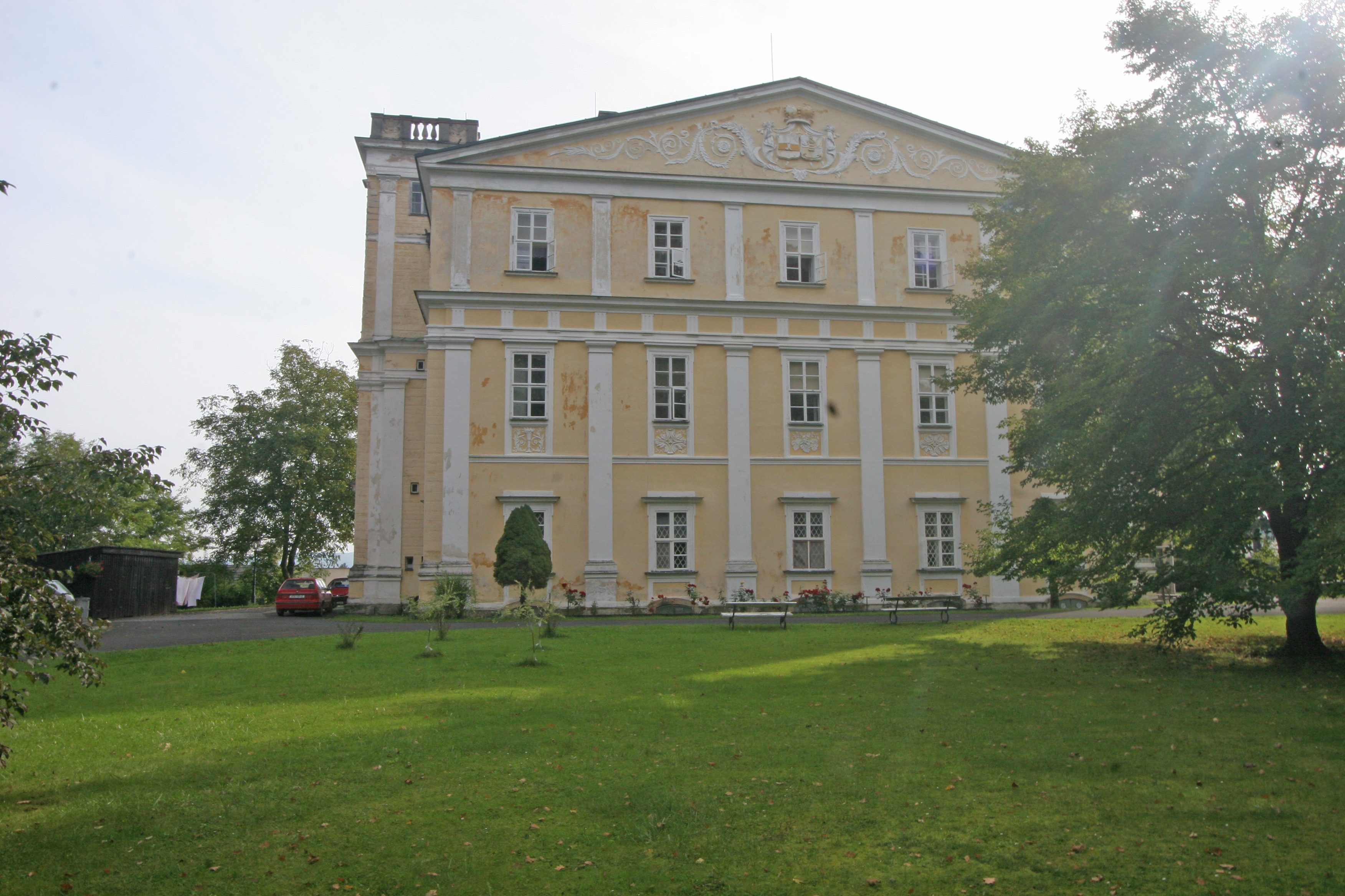 Zámek Milíčeves, Milíčeves 1